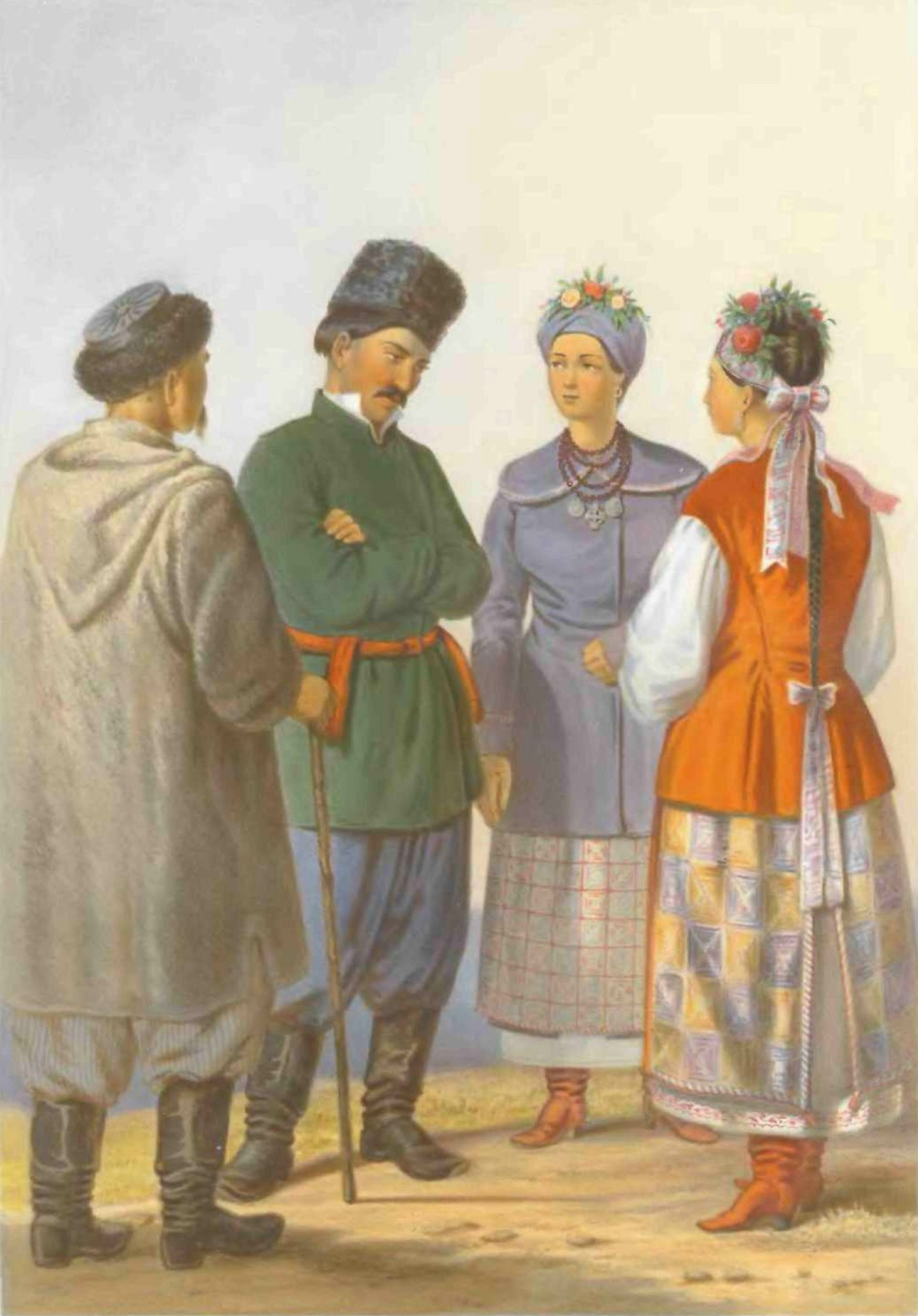 Малороссы